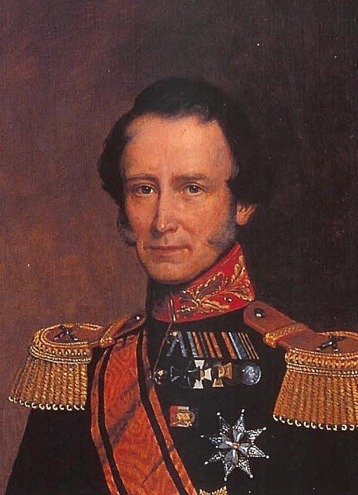 portret van prins Frederik (1797-1881)